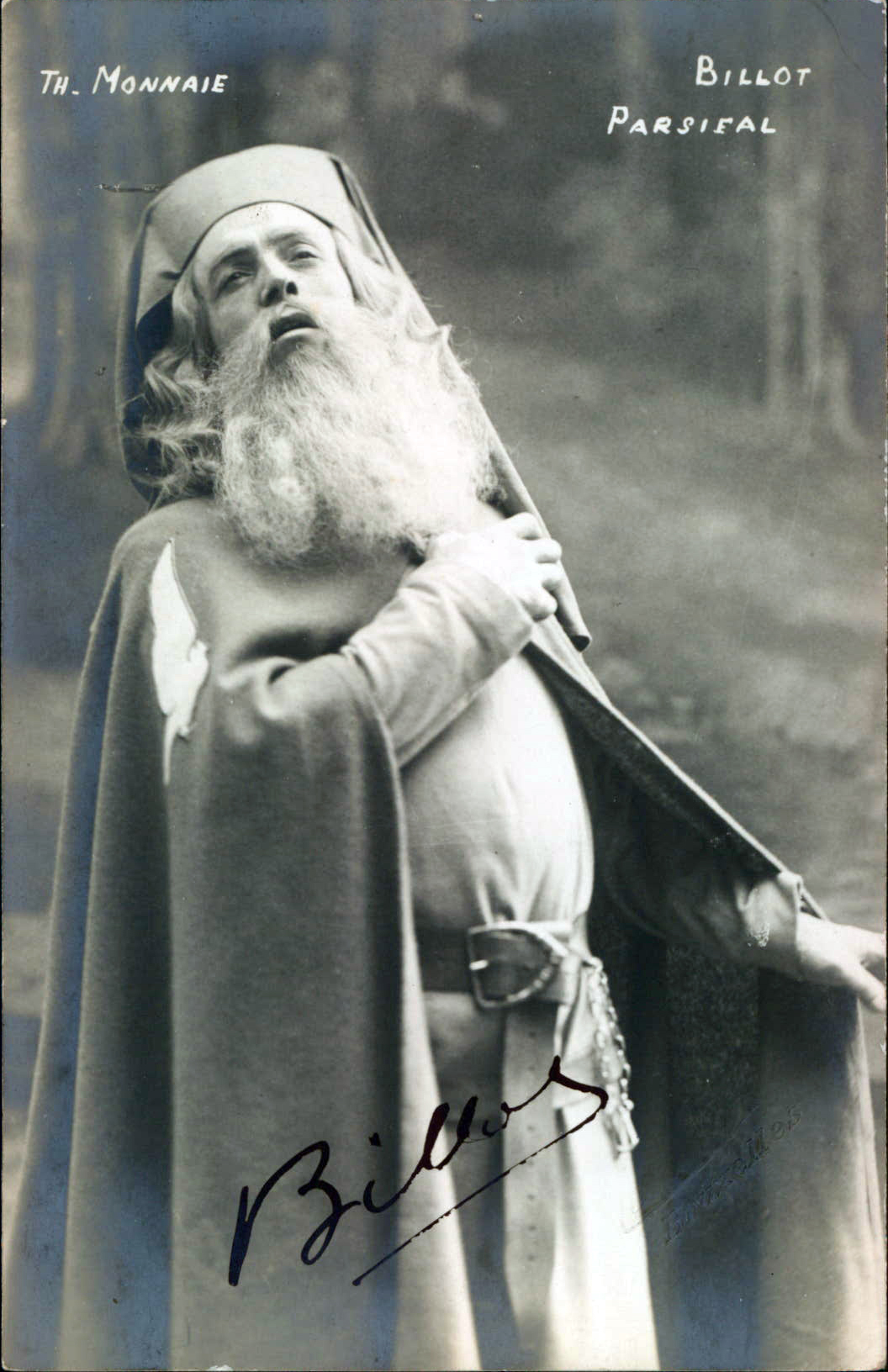 Portrait d'artiste du baryton Etienne Billot